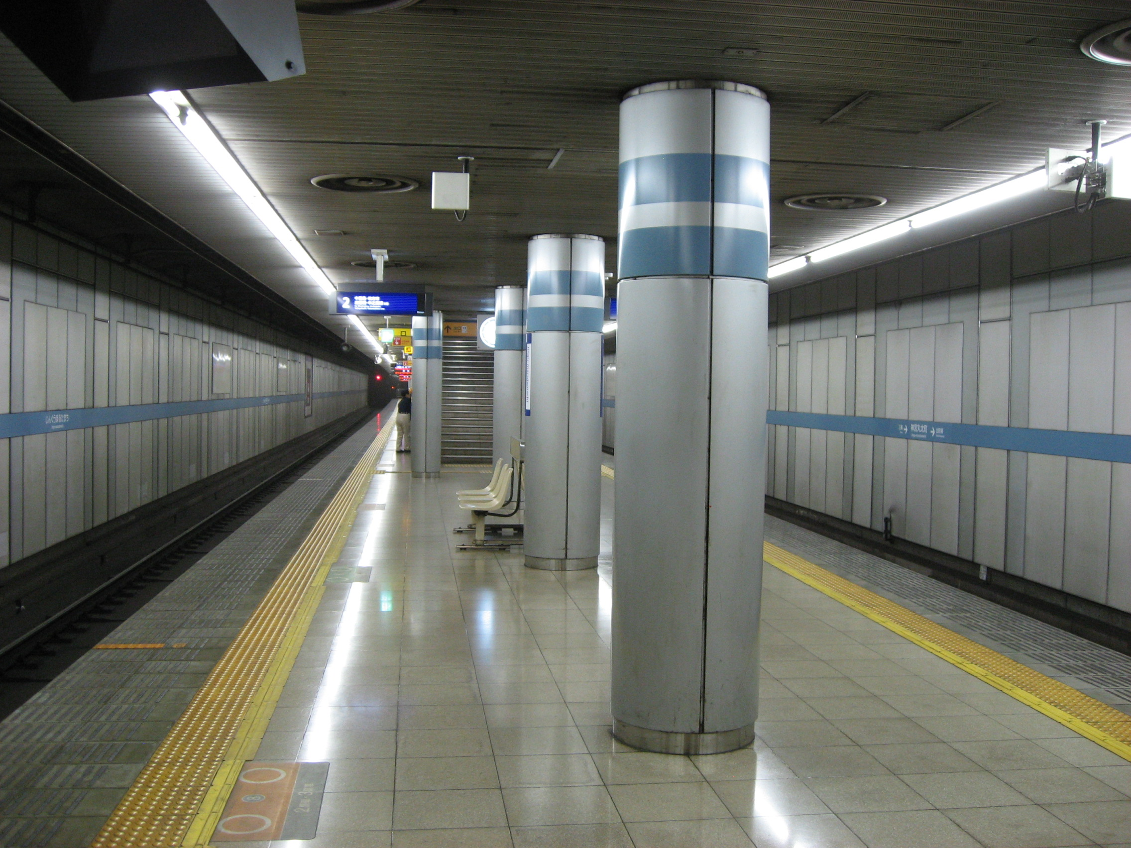 神宮丸太町駅プラットホーム